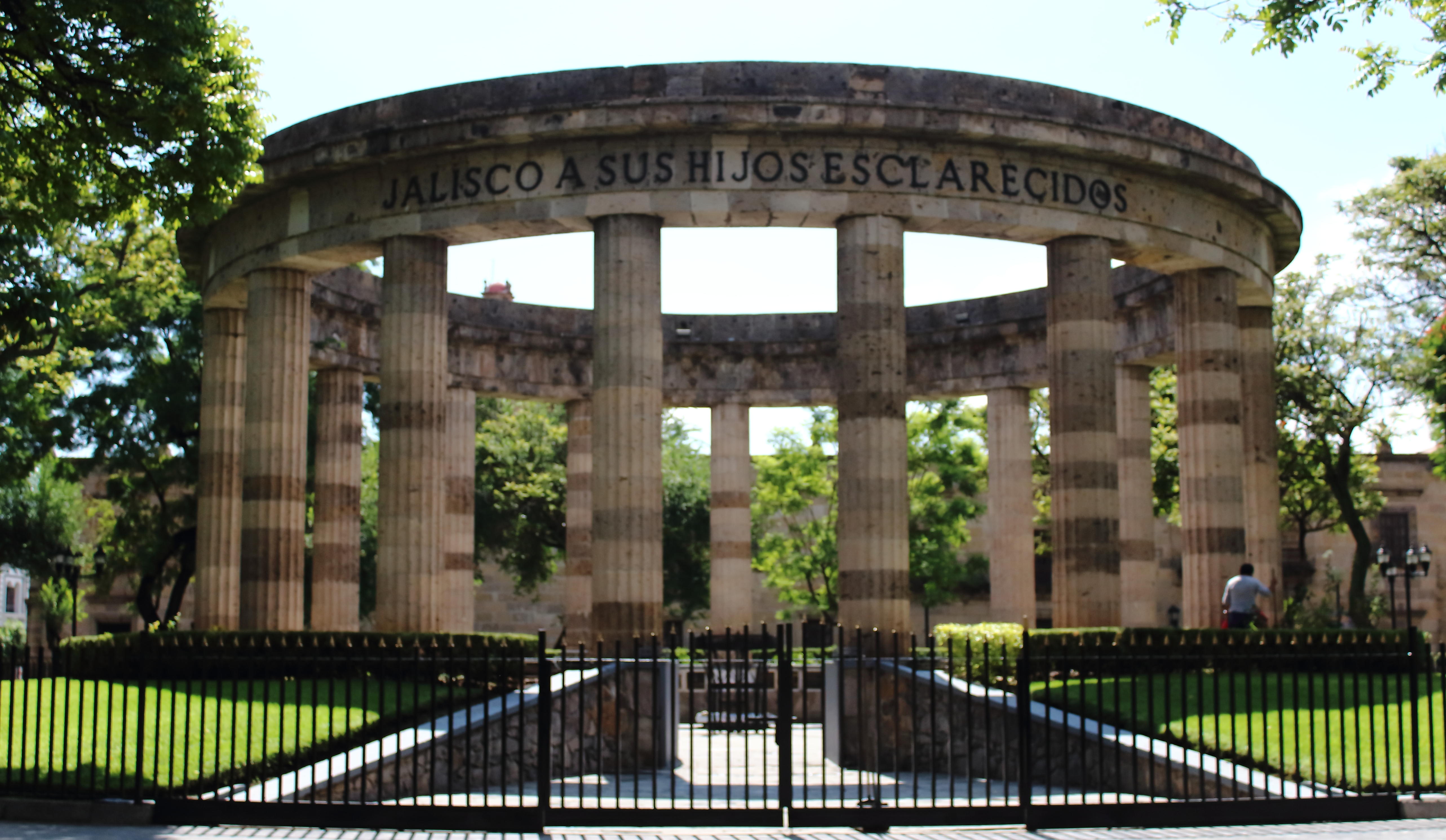 Rotonda de los Hombres Ilustres en Guadalajara, Jalisco. Esta obra está dedicada a las personas jalisienses más destacadas en la historia de México.